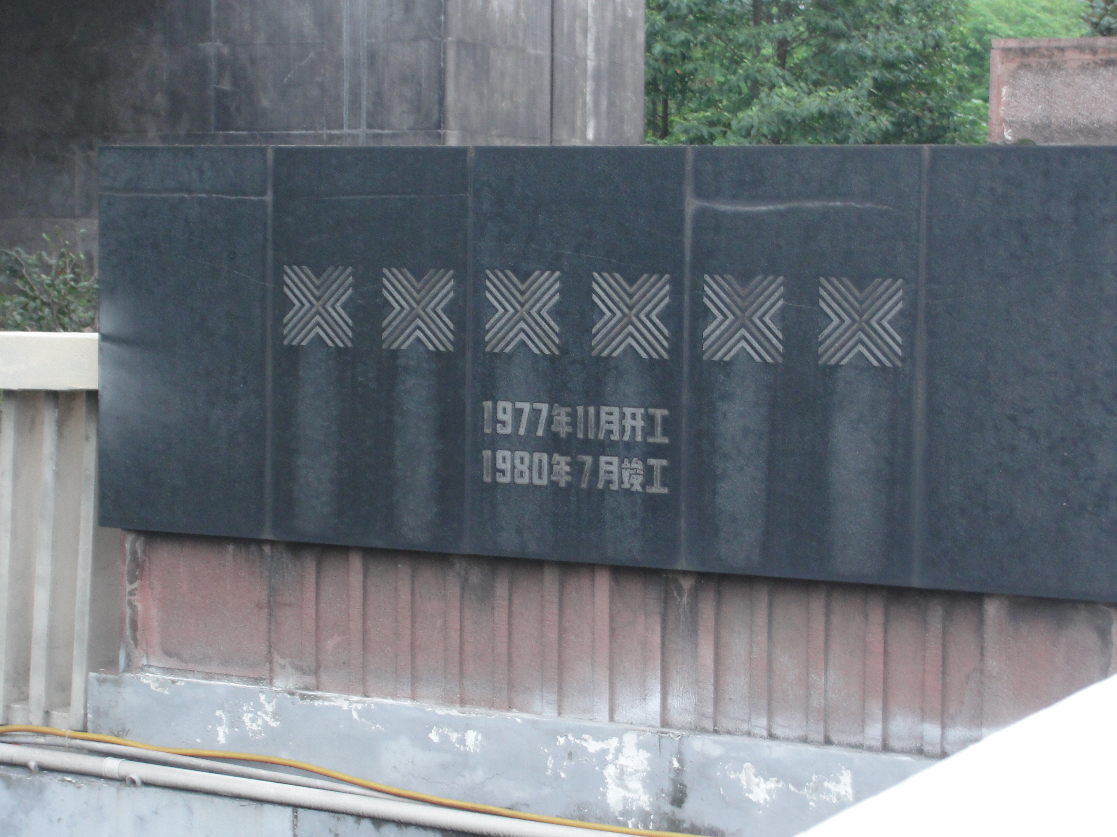 石碑上刻有开工时间与竣工时间